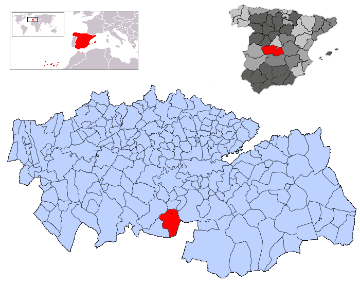 Las Ventas con Peña Agilera en la provincia de Toledo